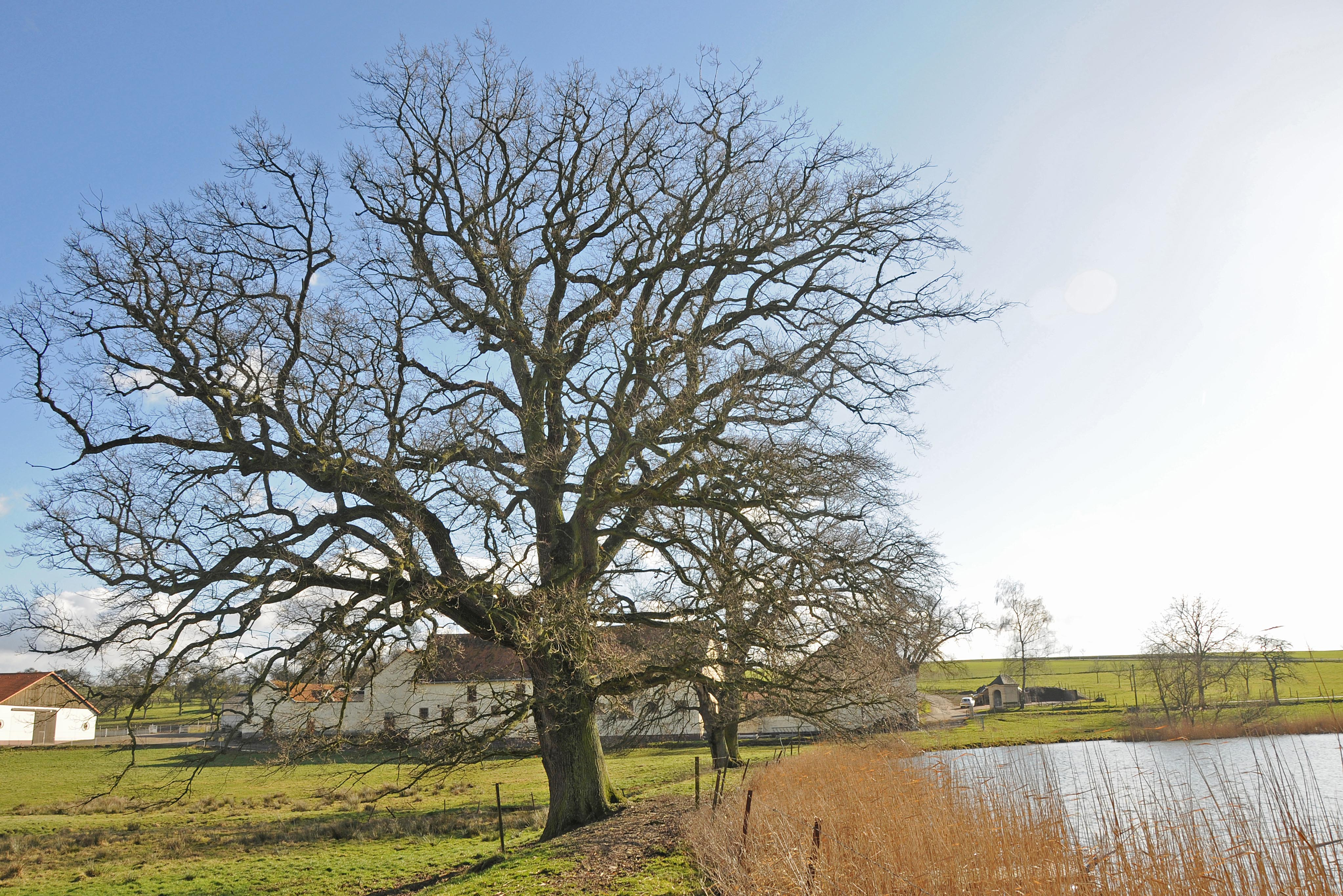 Eechen um Pläitrengerhaff.